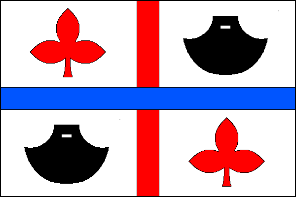 vlajka,Chromeč, okres Šumperk